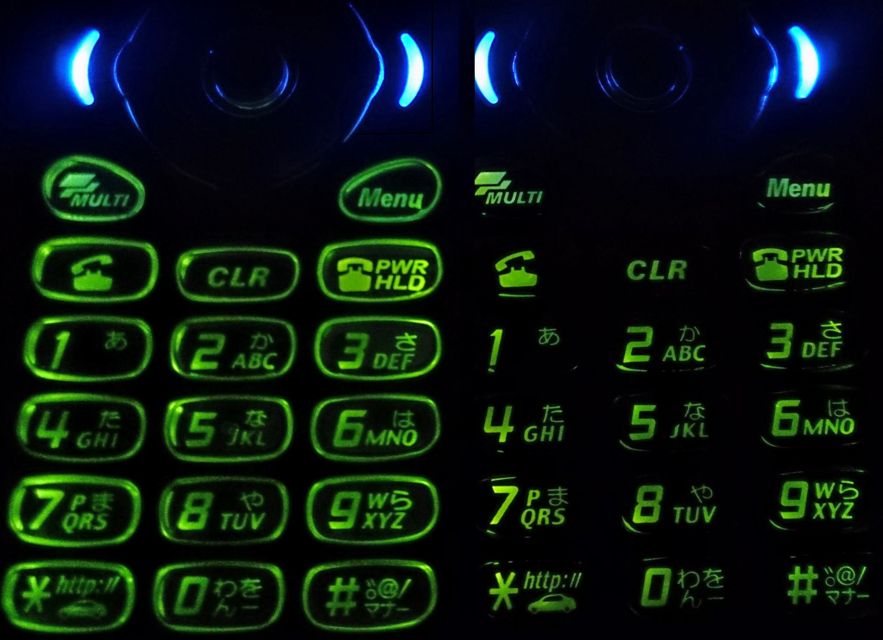 N2051(左がシルバー・右がブラック)のボタン操作部・照光方式はシルバーが「面照光」・ブラックが「点照光」である。